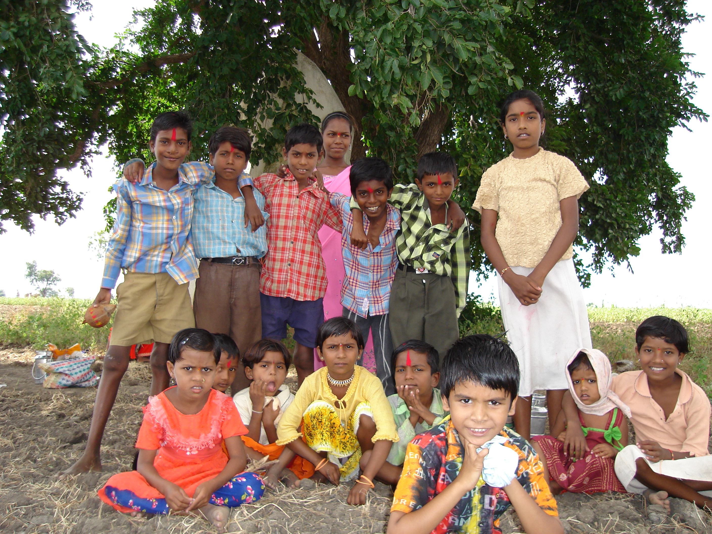 टाकणकार